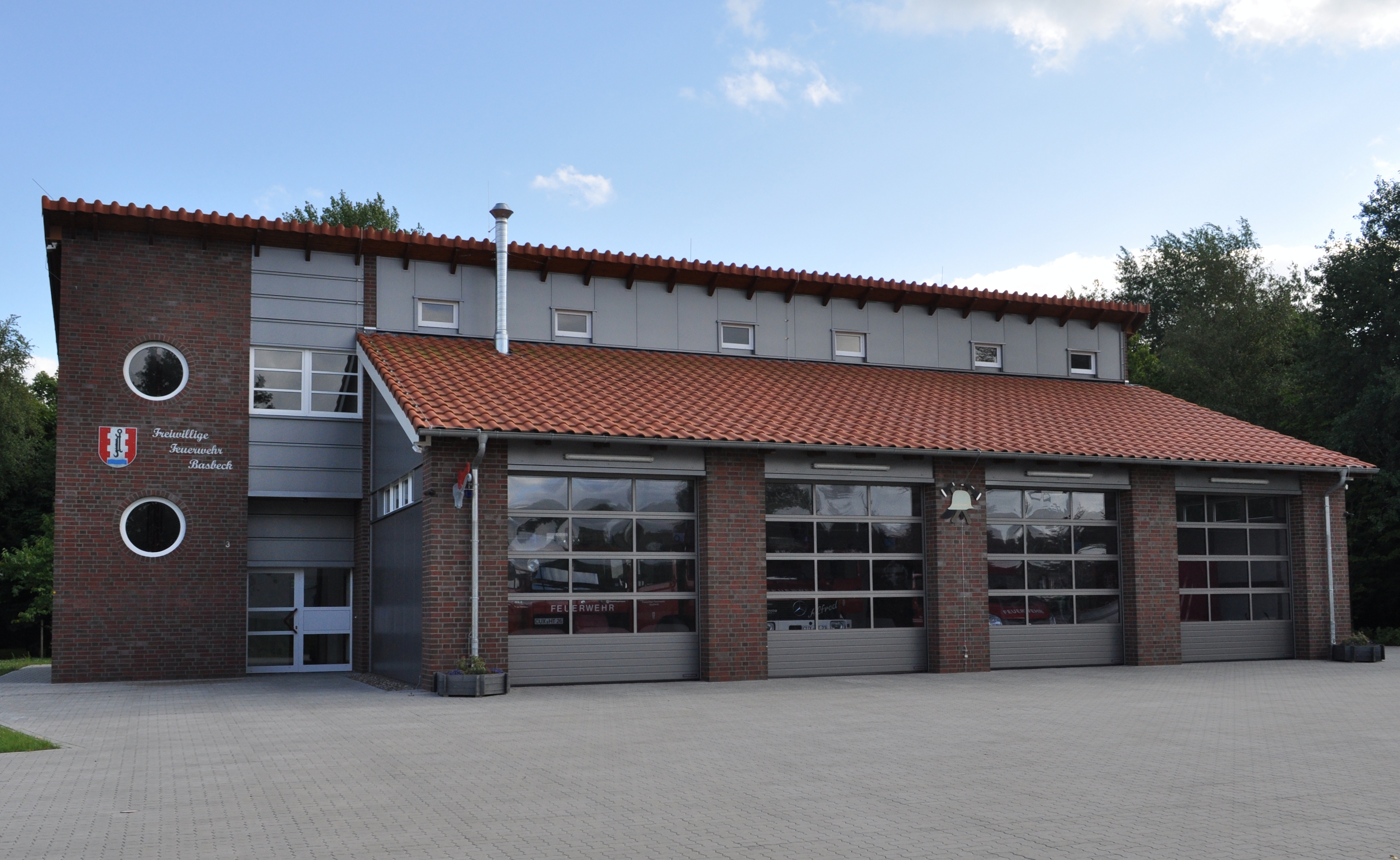 Gebäude der Freiwilligen Feuerwehr Basbeck in Hemmoor.